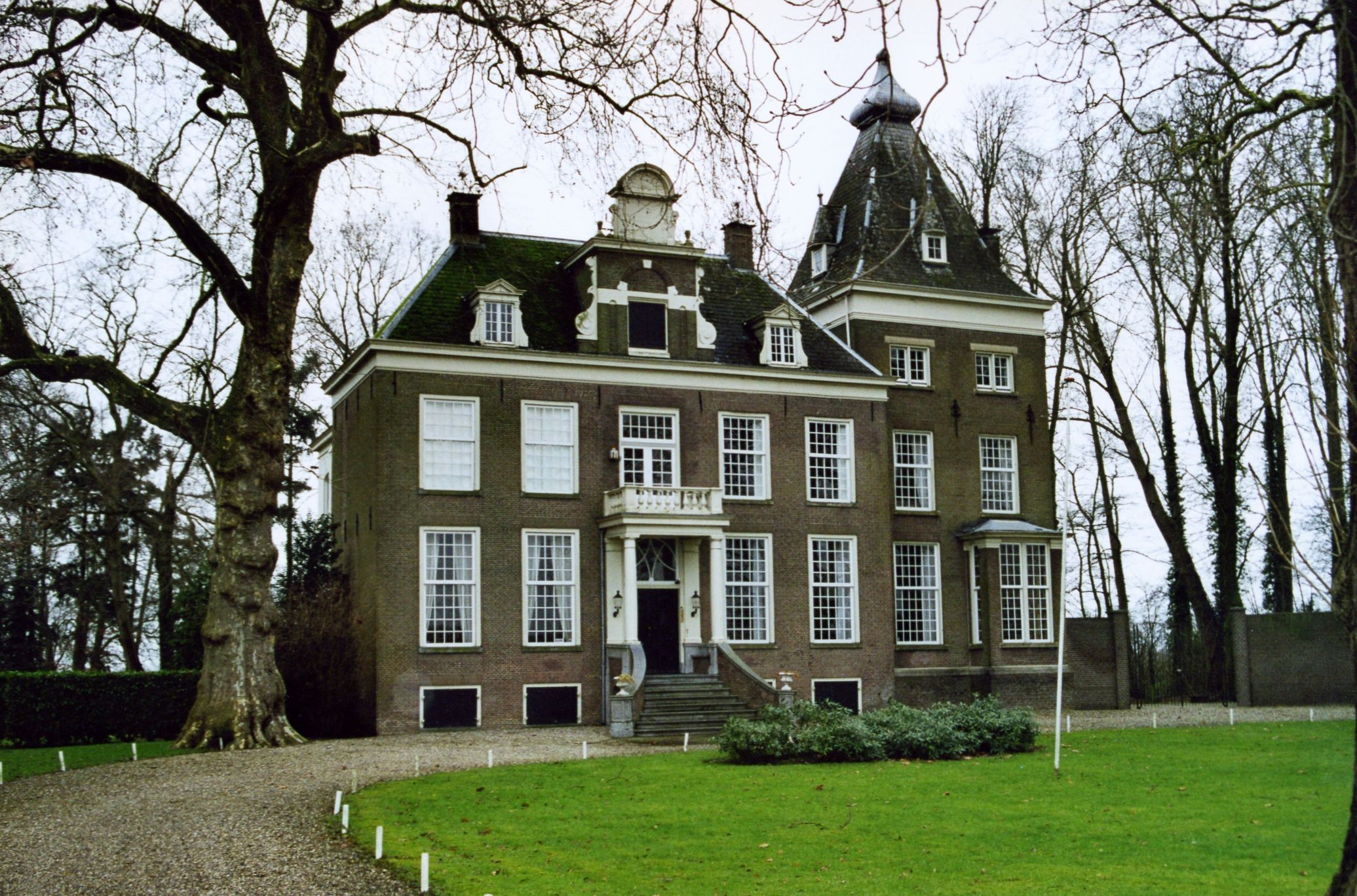 Huize Cruysvoorde te Twello.